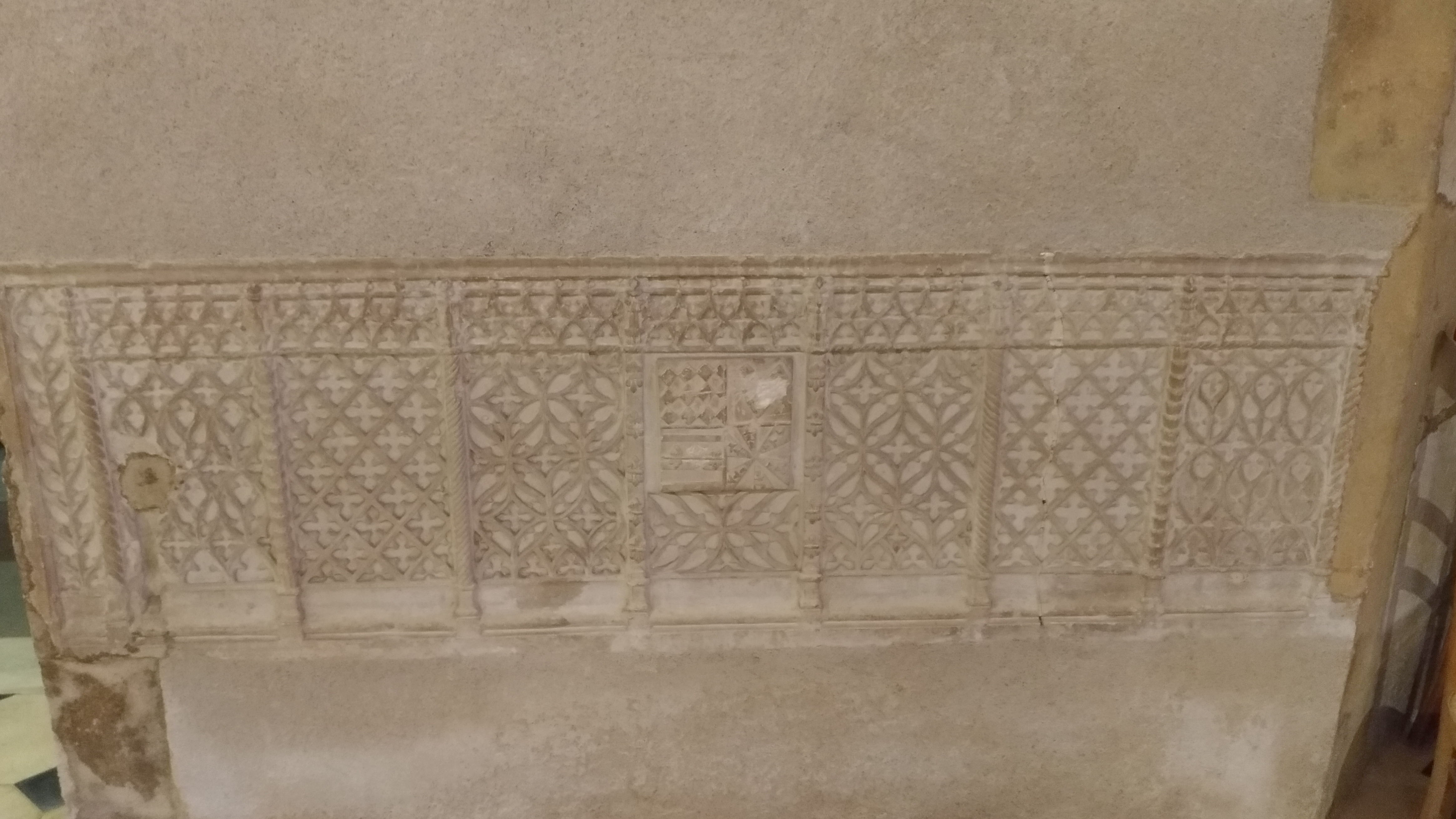 Dossier du banc seigneuriale de l'église